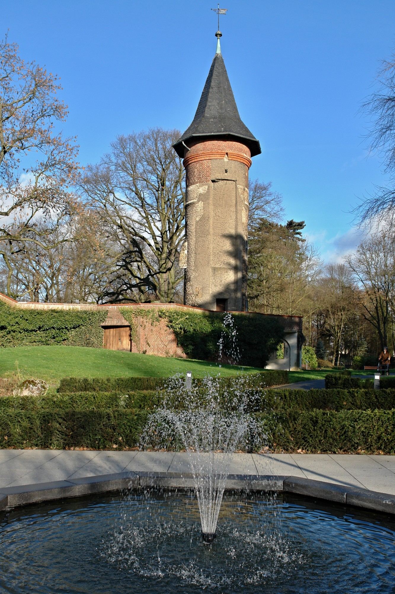 Brunnen am Turm von Haus Horst, Hilden, Horster AlleeThis is a photograph of an architectural monument.